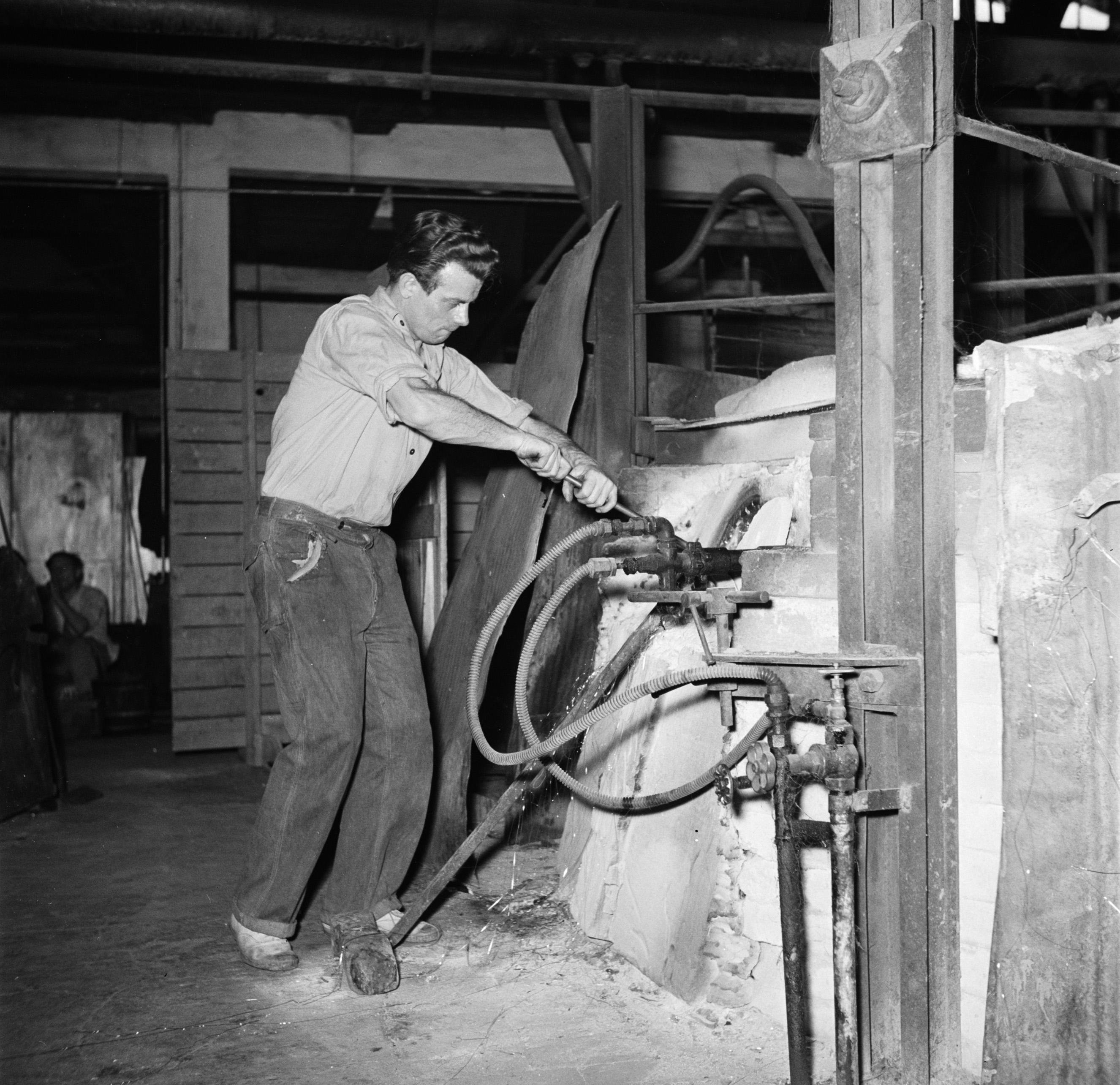 Collectie / Archief : Fotocollectie Van de Poll Reportage / Serie : In de Holmegaard Glasfabriek Beschrijving : Glasblazers aan het werk in de fabriek Datum : maart 1954 Locatie : Denemarken, Fensmark Trefwoorden : gereedschap, glas, glasblazers, glasindustrie, glaskunst Fotograaf : Poll, Willem van de, [onbekend] Auteursrechthebbende : Nationaal Archief Materiaalsoort : Negatief (zwart/wit) Nummer archiefinventaris : bekijk toegang 2.24.14.02 Bestanddeelnummer : 252-8906